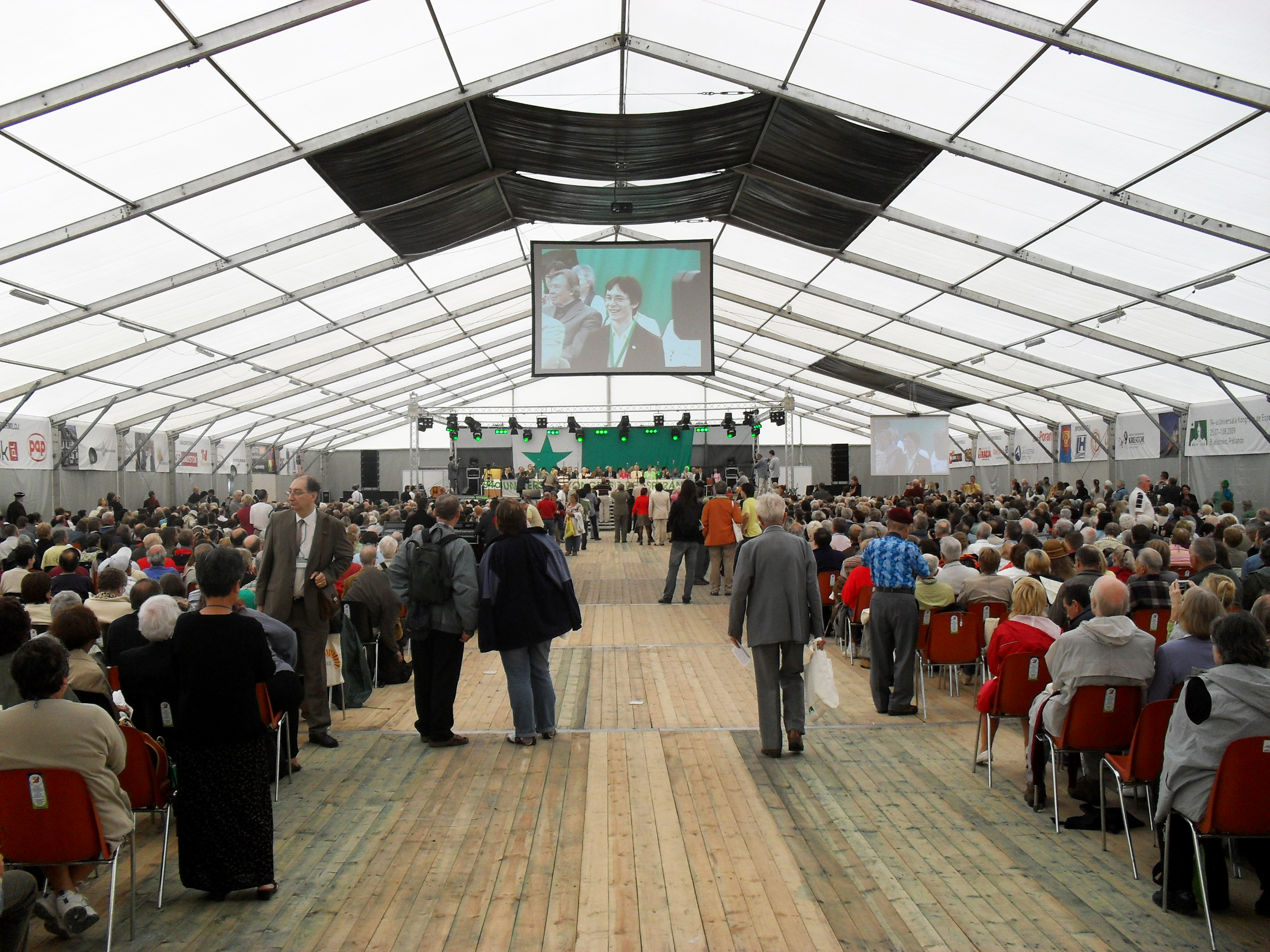 Universala Kongreso de Esperanto en Bjalistoko, Pollando, 2009. Solena malfermo.